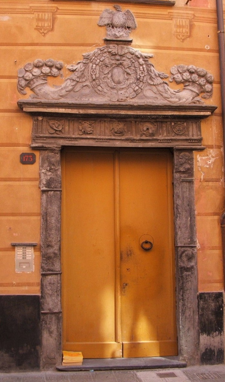 Immagine da Sestri Levante